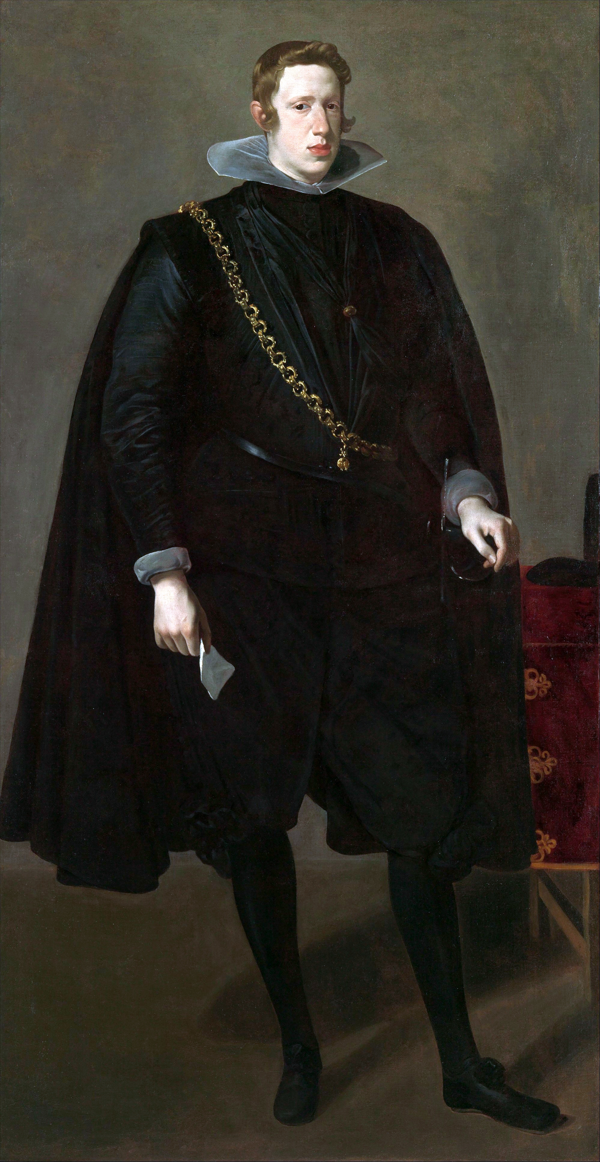 Velázquez: Felip IV dret. Nova York, Metropolitan Museum of Art. Còpia autògrafa del retrat del Prado